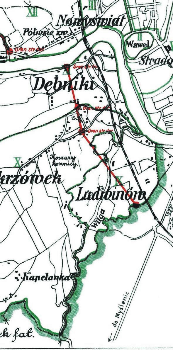 Ludwinów już jako dzielnica Krakowa w 1910 roku.